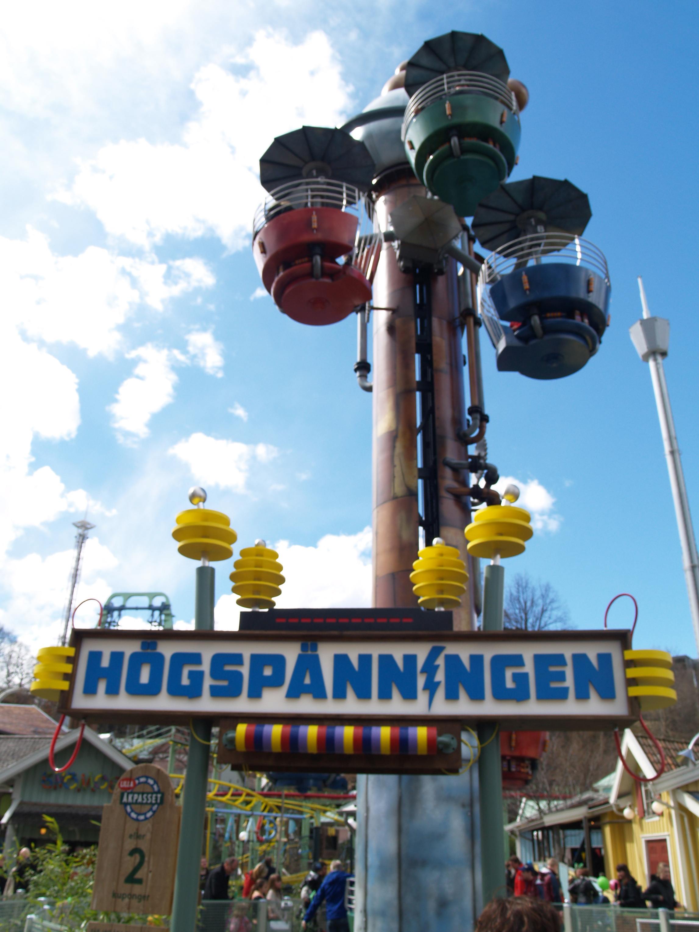 Åkattraktionen Högspänningen i nöjesparken Liseberg, Göteborg.